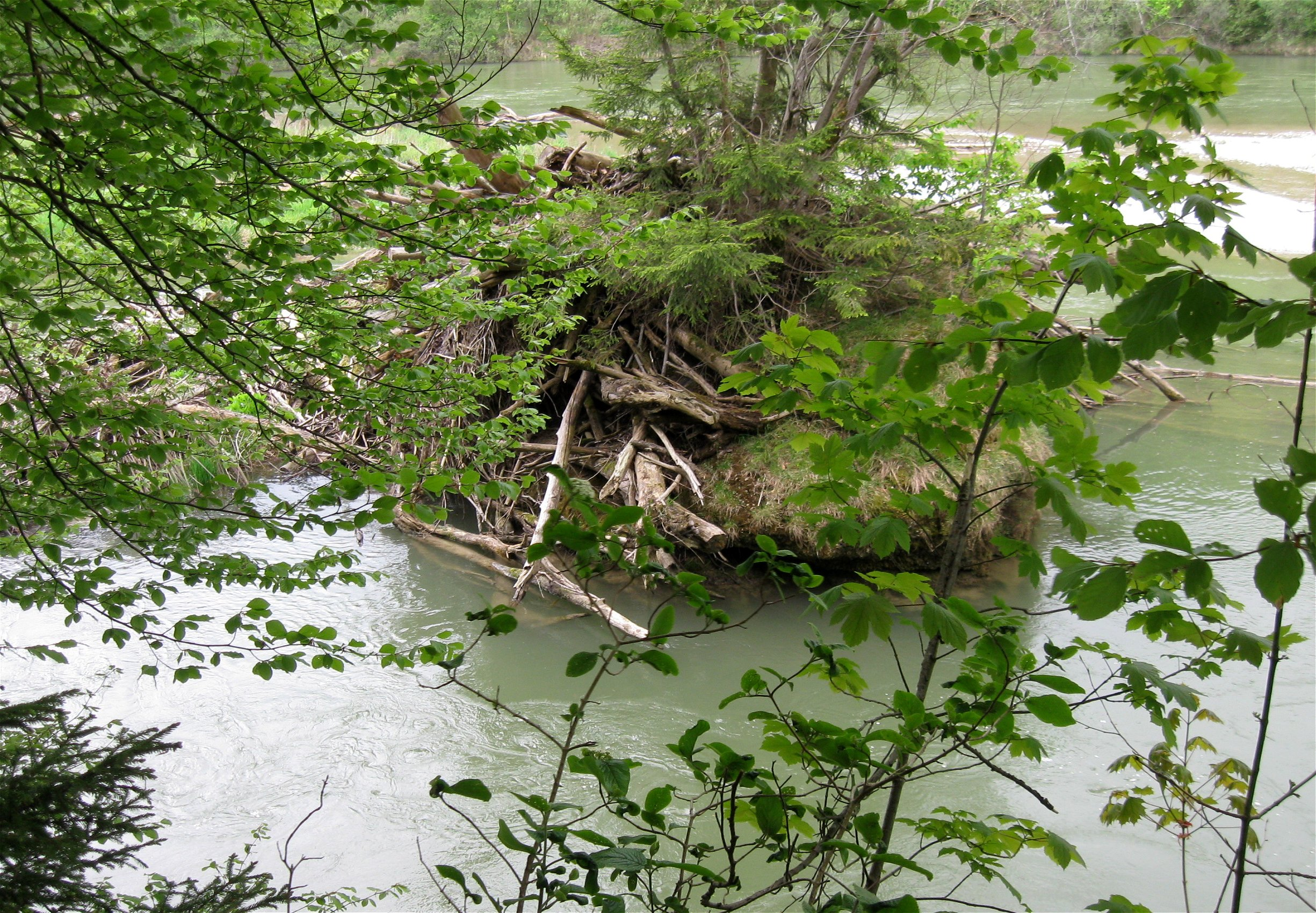 Felsen in der Isar bei Grünwald, vom Georgenstein ca. 200m flussabwärts; möglicherweise der St. Michaelstein